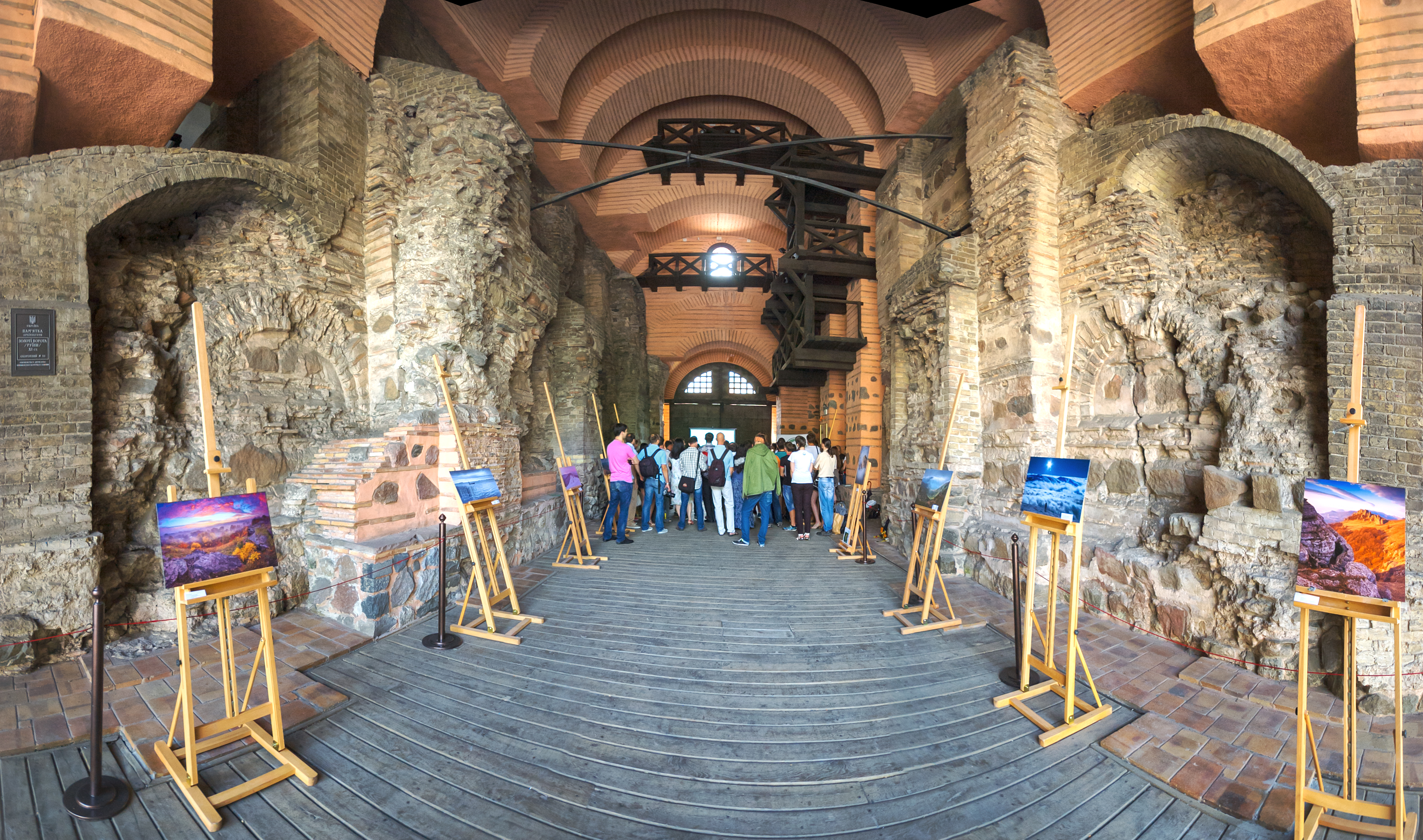 дгнщш